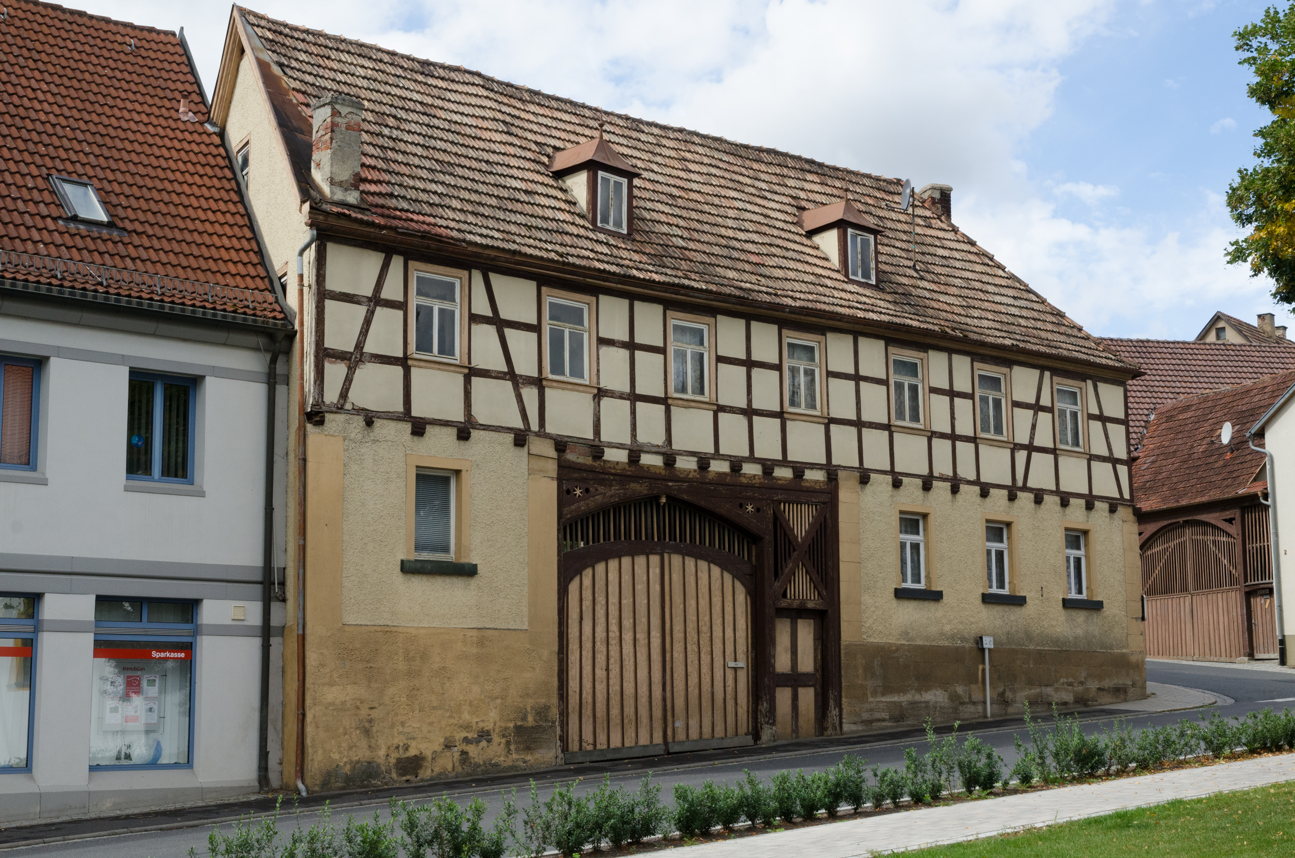 Maßbach, Poppenlauerer Straße 21